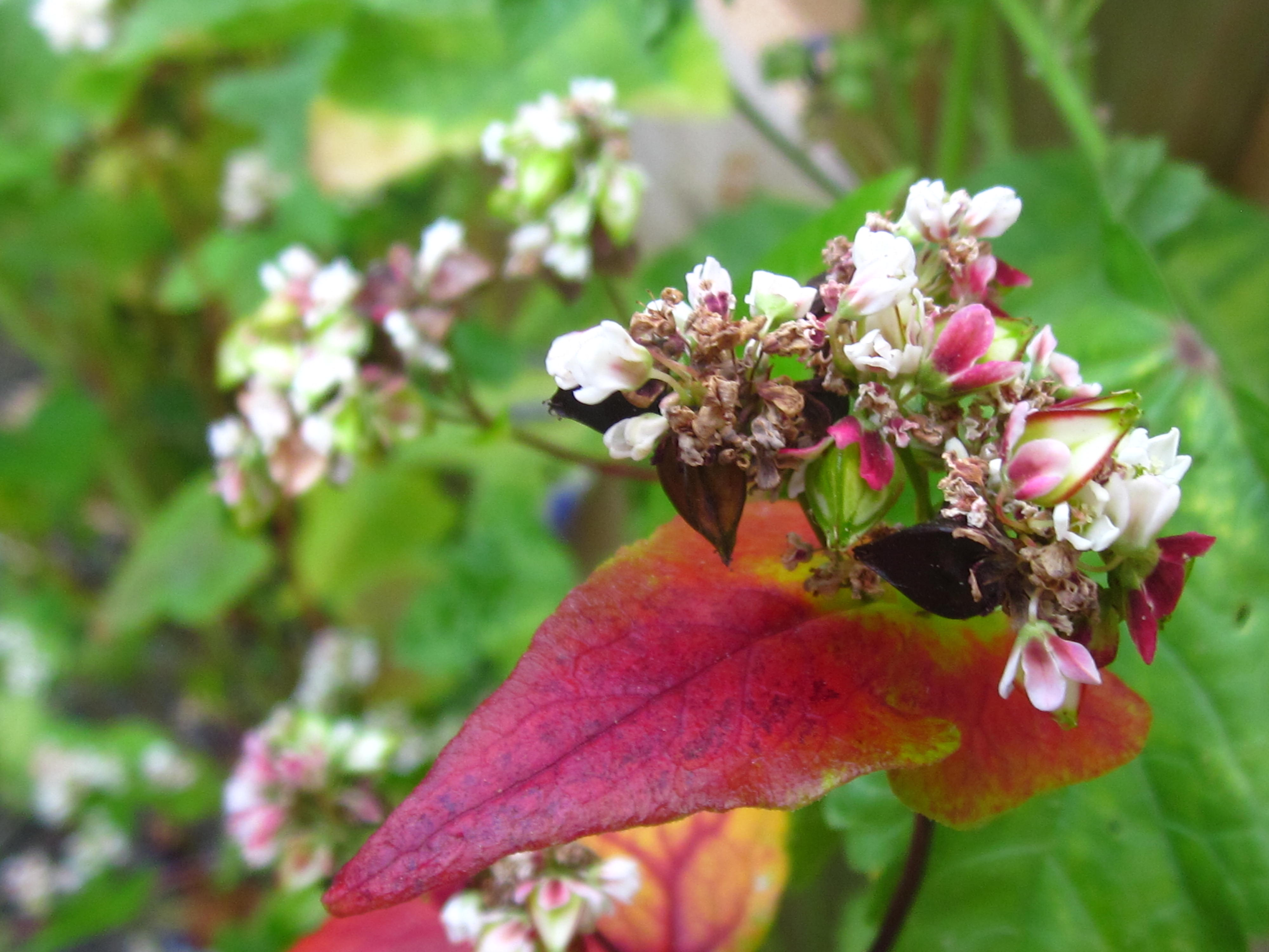 Half juli 2013; rijpend boekweit met bloemen, vruchten en naar rood verkleurend blad